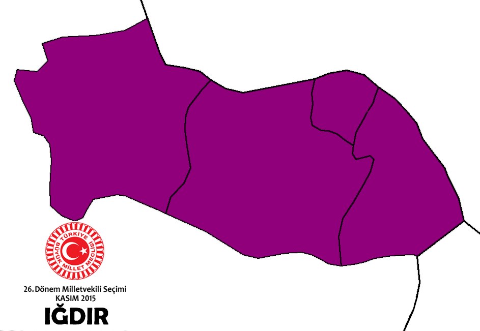 Kasım 2015 seçimleri